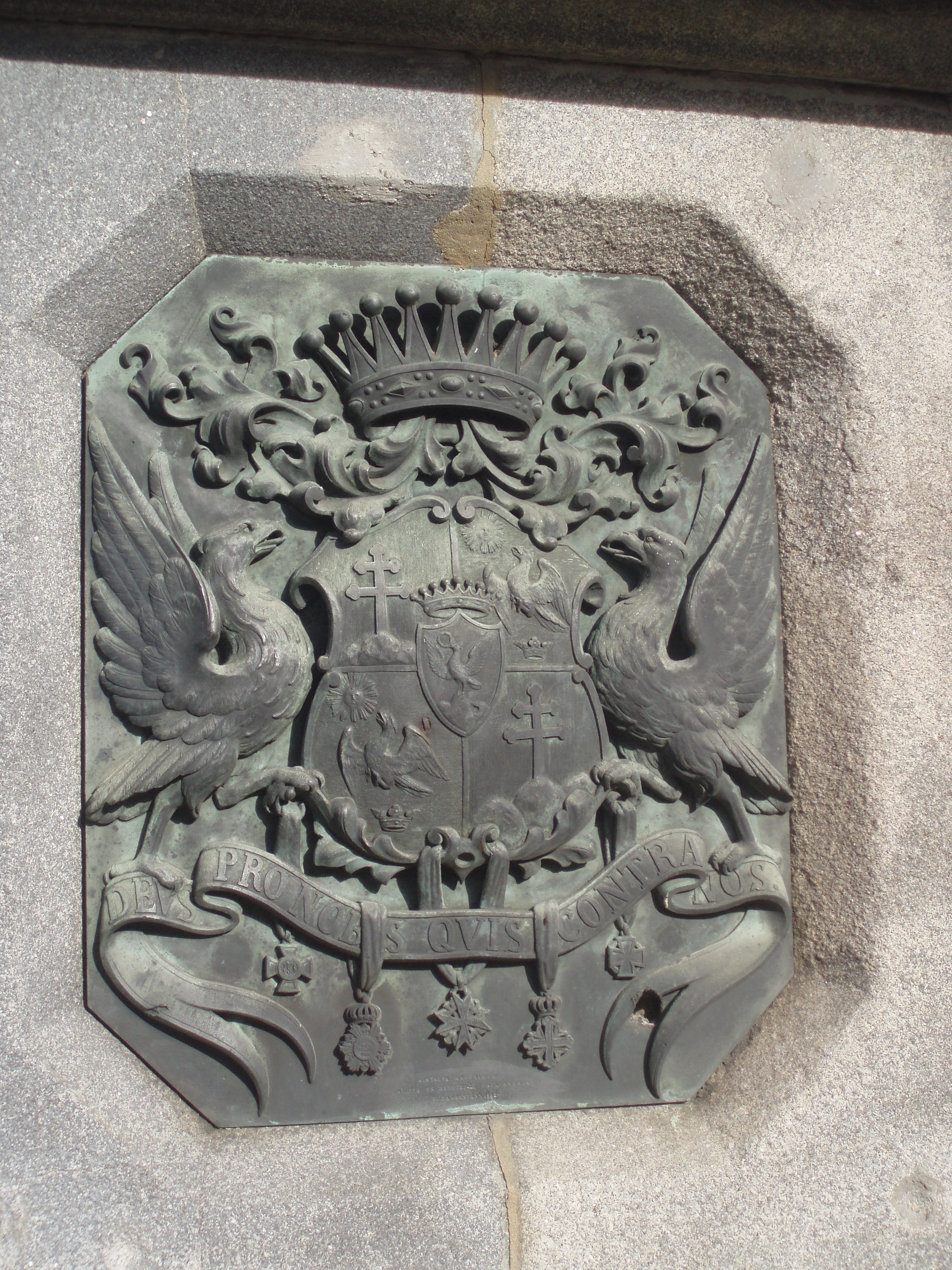 A Széchenyi-Sina címer a lánchíd kőoroszlánjainak talapzatán